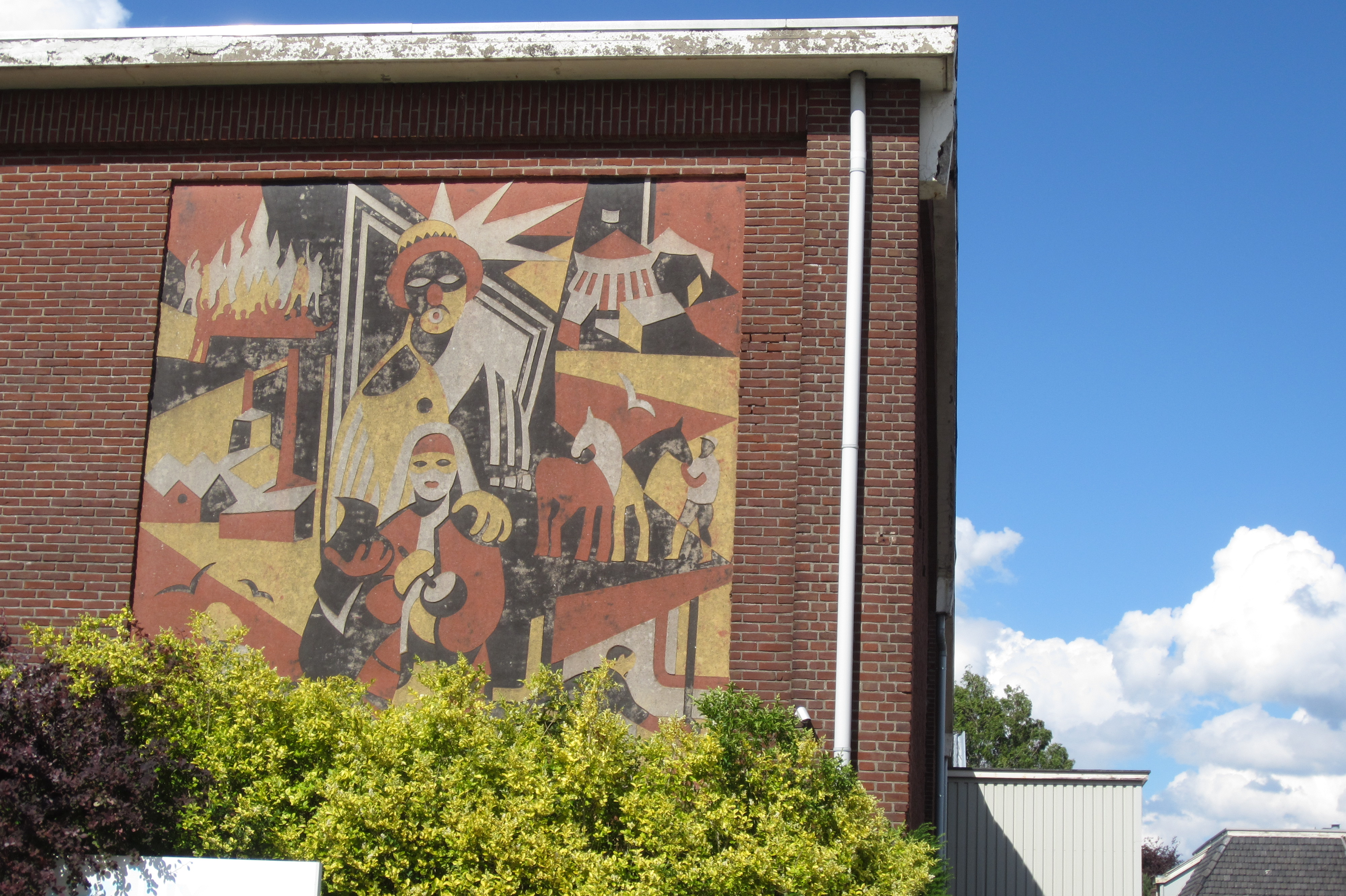 Sgrafitto (1958) van Wim ten Broek. Zonder titel of titel onbekend. Locatie: voormalige Twentse Stoomblekerij (parkeerterrein Finigoor), D.J. Bunschotenstraat te Goor.